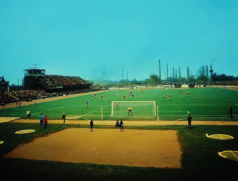 Original image description from the Deutsche FotothekSport, Fußballmannschaft